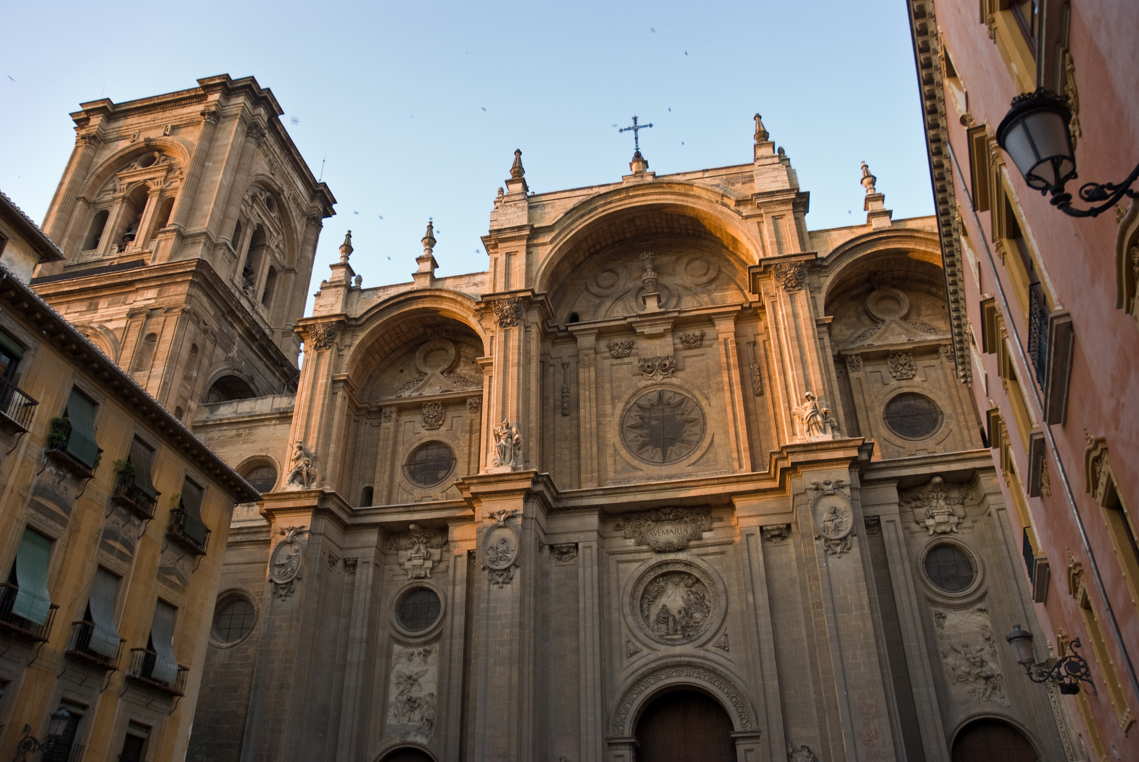 Portail sud (Cathédrale de l'Incarnation, Grenade, Espagne)